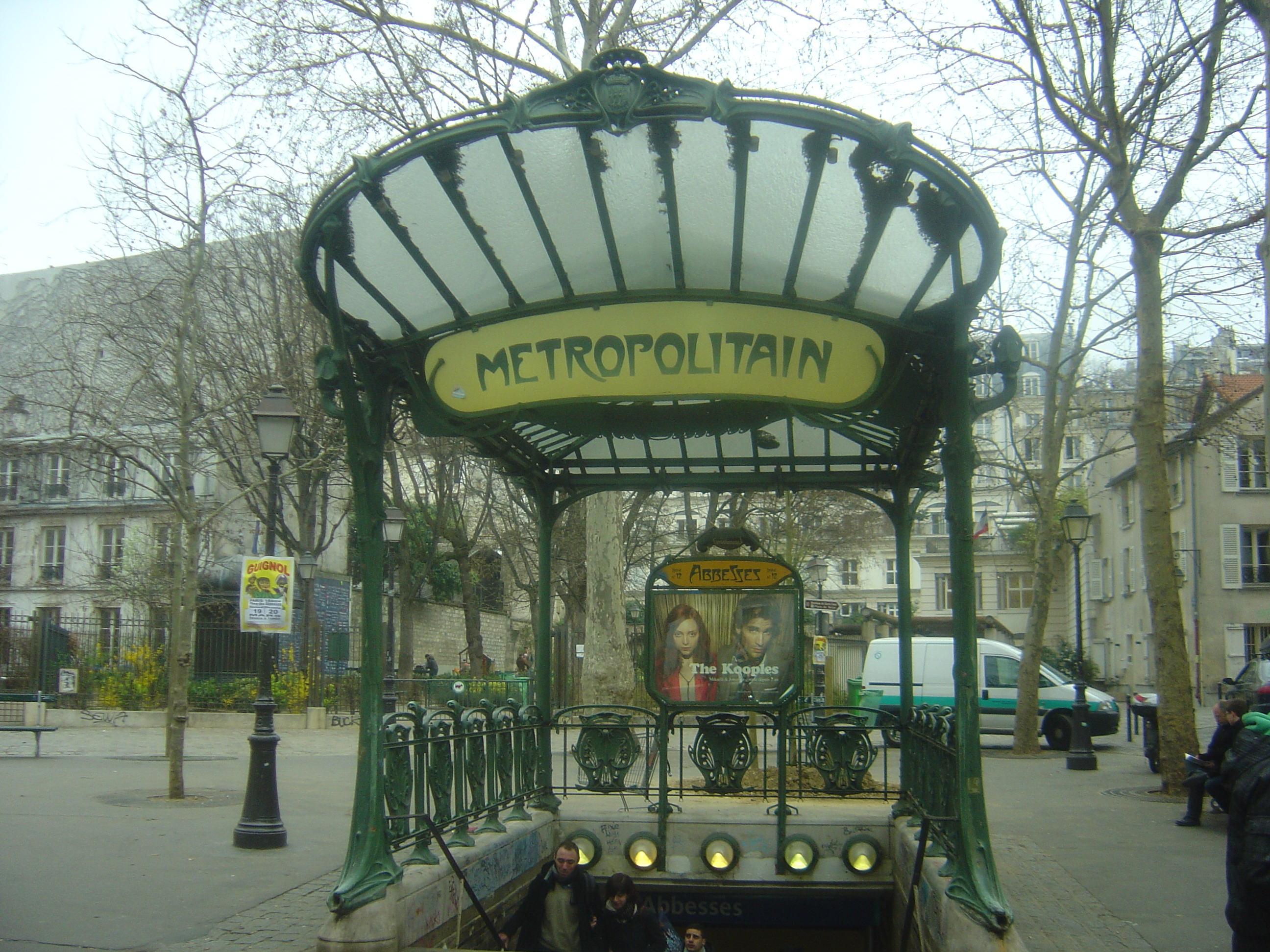 Αρ Νουβό σταθμός του μετρό Αμπές (Abesses), Παρίσι. Σχεδιασμός Εκτόρ Γκιμάρ.